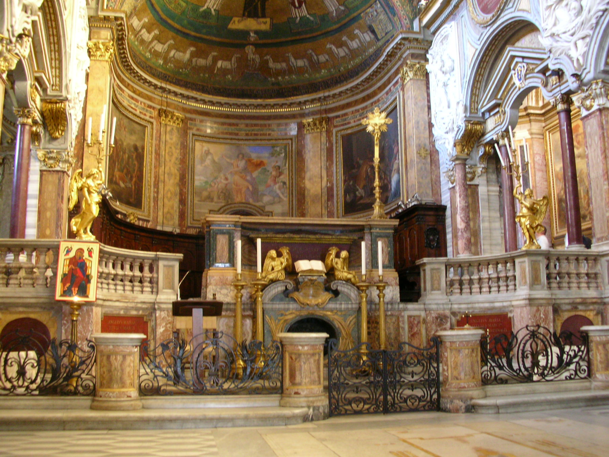 Main Altar, San Marco, Rome